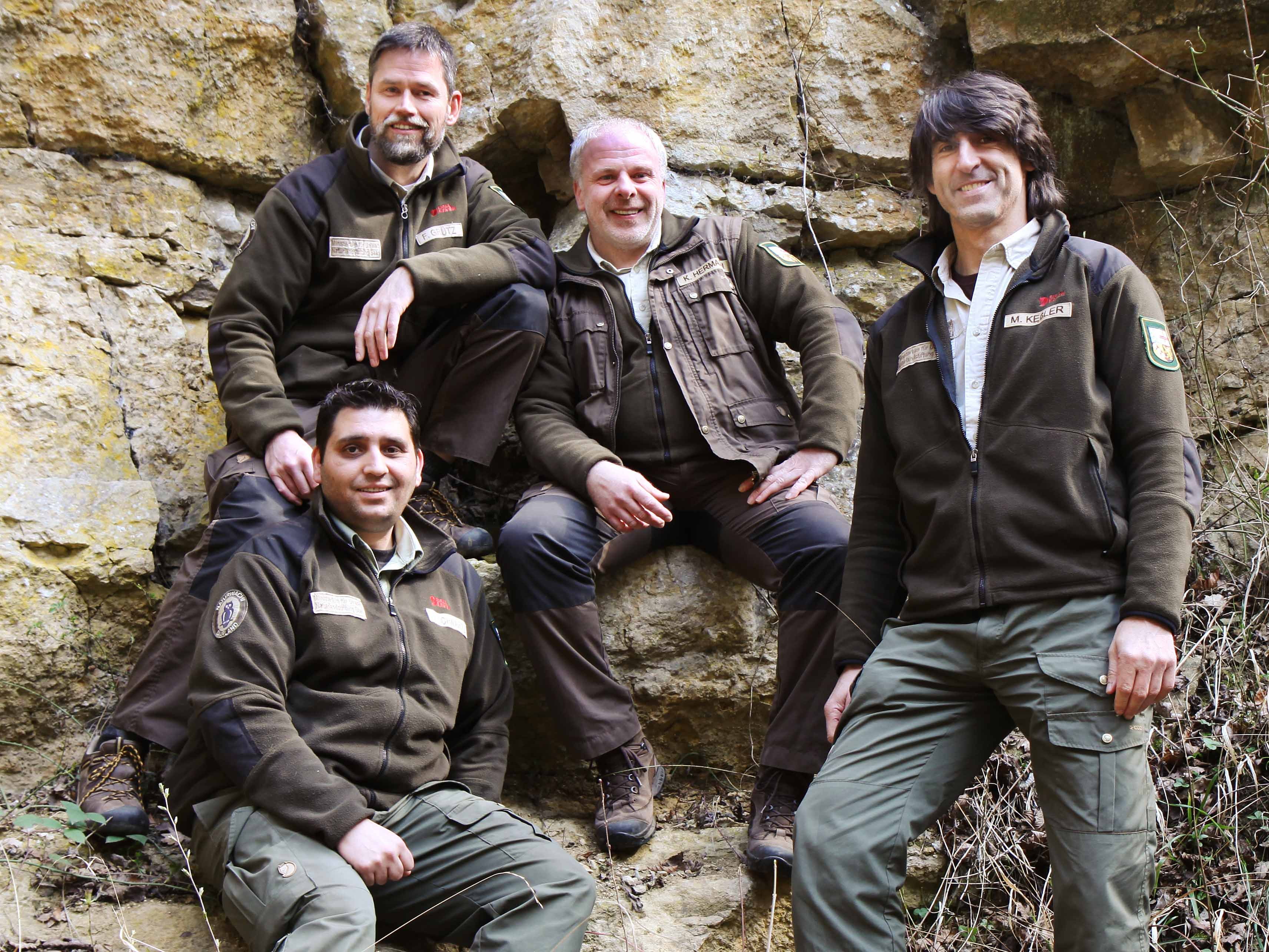 Die vier Ranger der Naturwacht Saarland